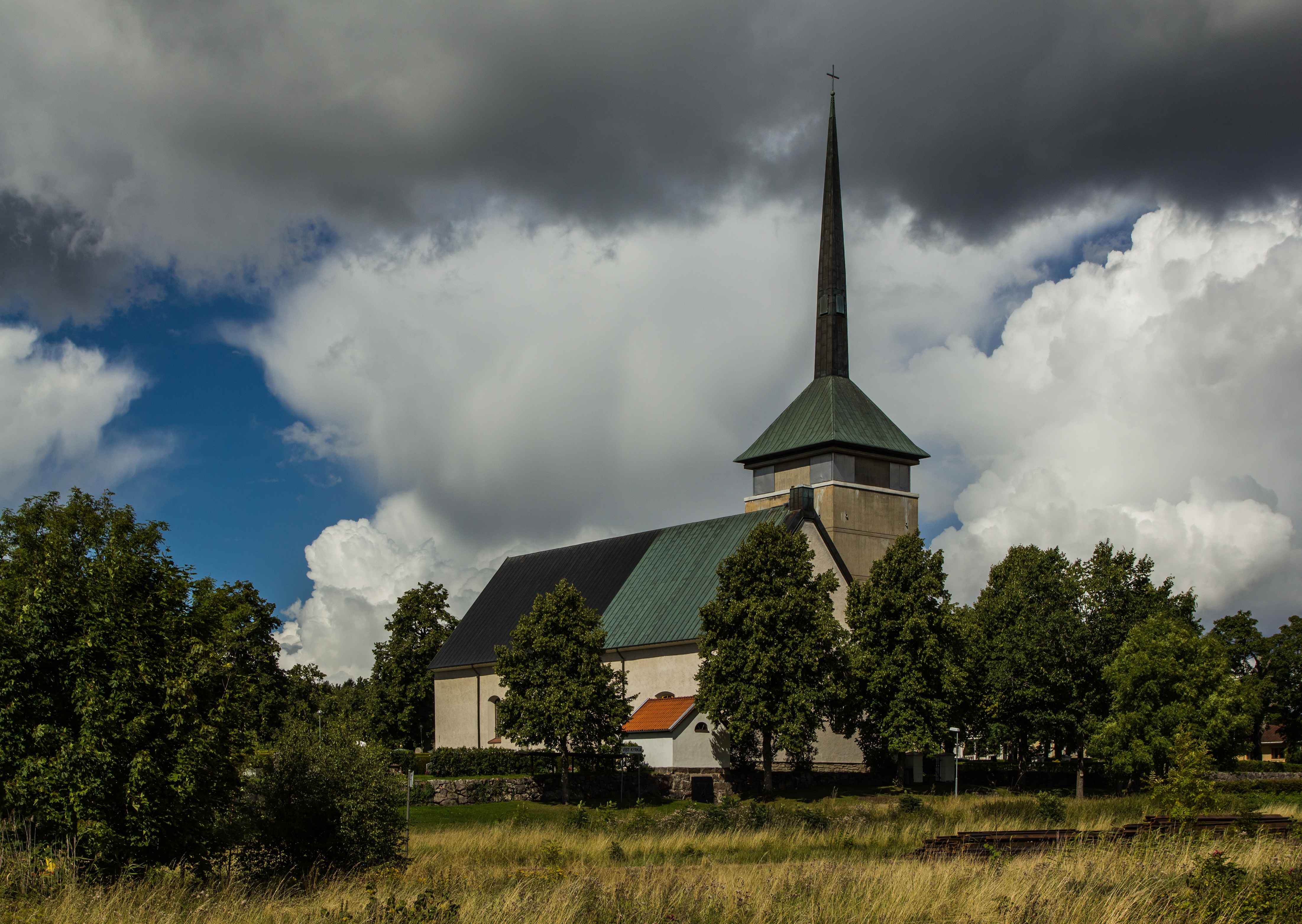 Vist kyrka, Sturefors, Östergötlands län